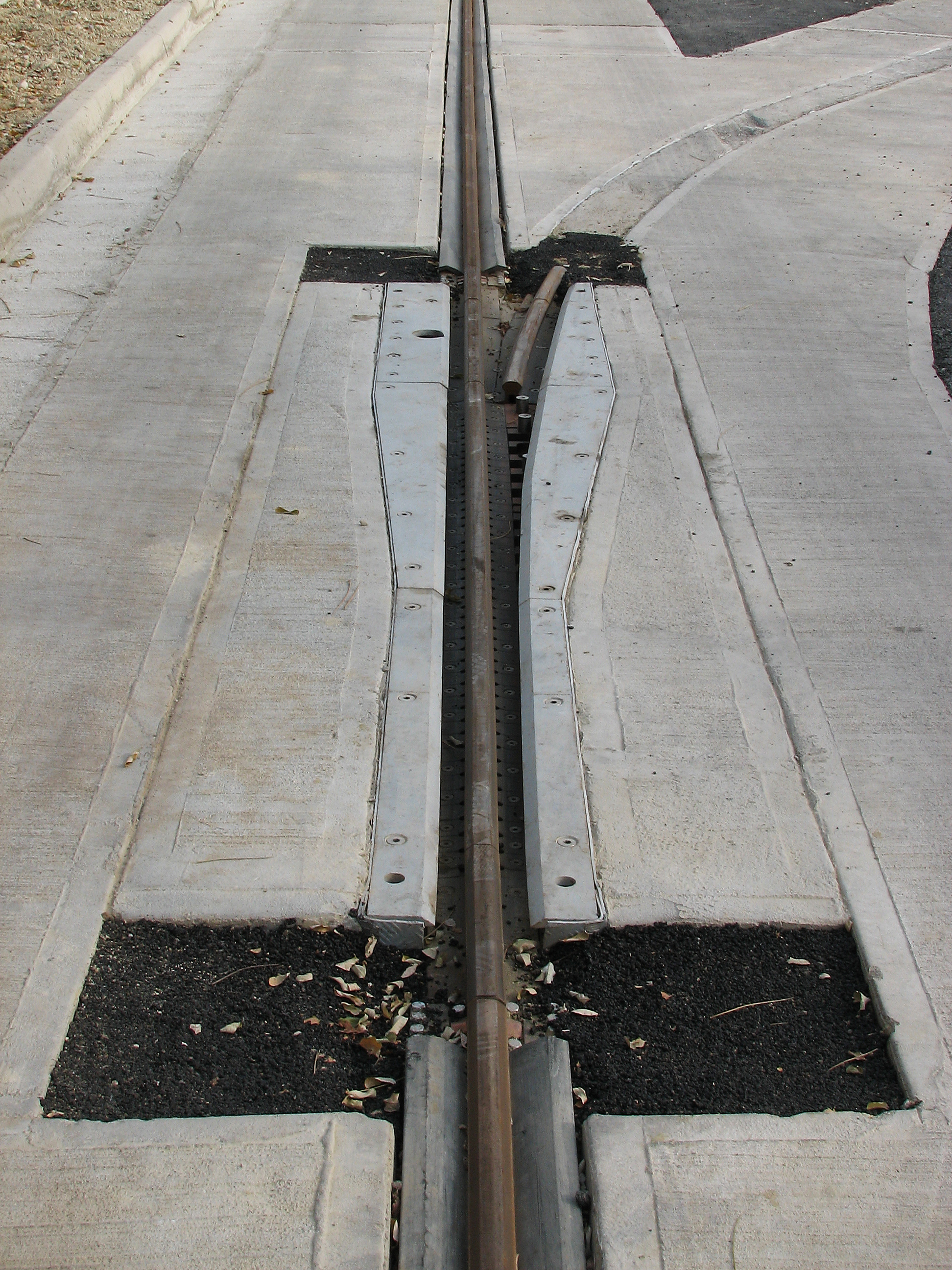 Uno scambio del sistema Translohr, qui installato al Deposito Favaro (Mestre).